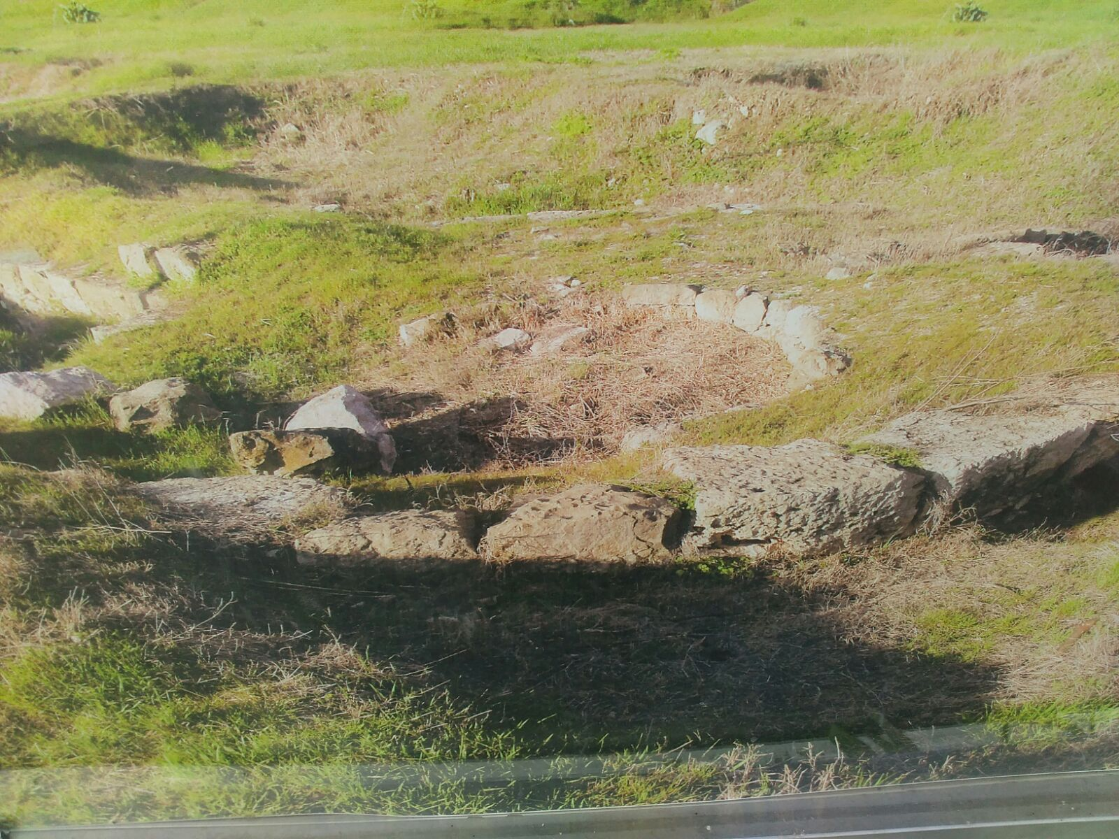 Castru Roman Ovidiu-CT 01